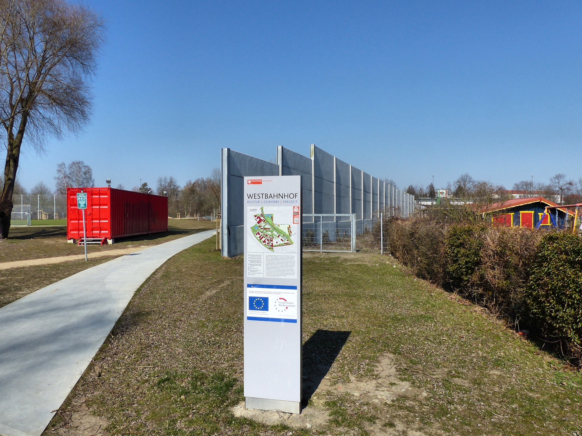 Infotafel "Westbahnhof" am Zuweg zum Jugendplatz